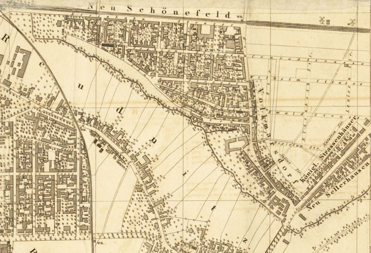 Ausschnitt (östliche Teile) aus einem Stadtplan von Leipzig 1864